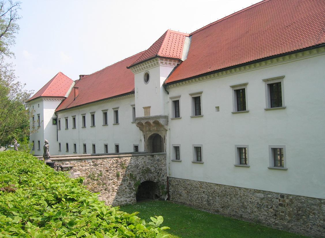 Fužine castle, Ljubljana photo:Ziga 13:05, 7 May 2006 (UTC)